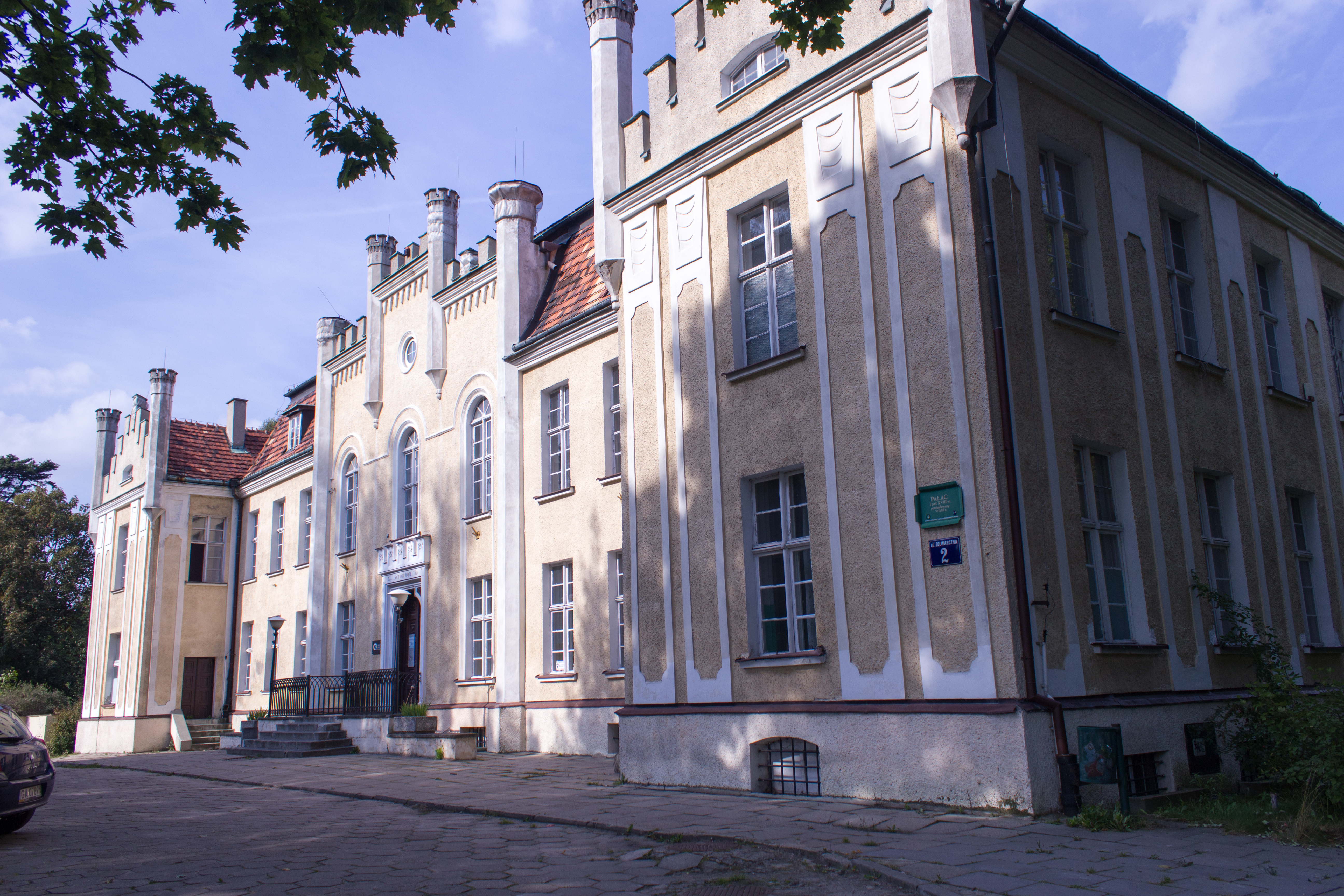 Zespół pałacowo-parkowy (pałac, park, ptaszarnia) ul. Folwarczna 2, Gdynia